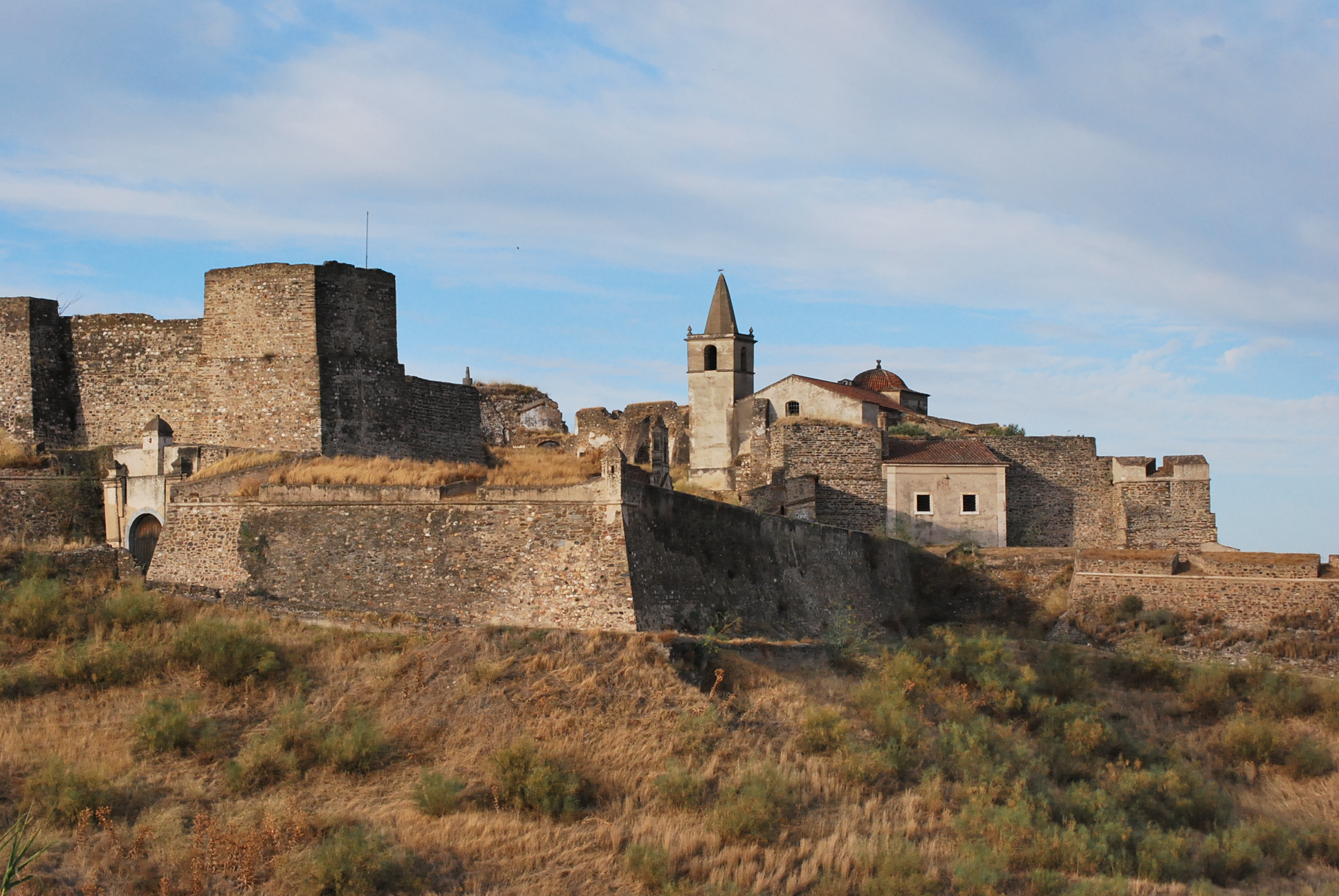 Vista da fortaleza de Juromanha através do miradouro da localidade.